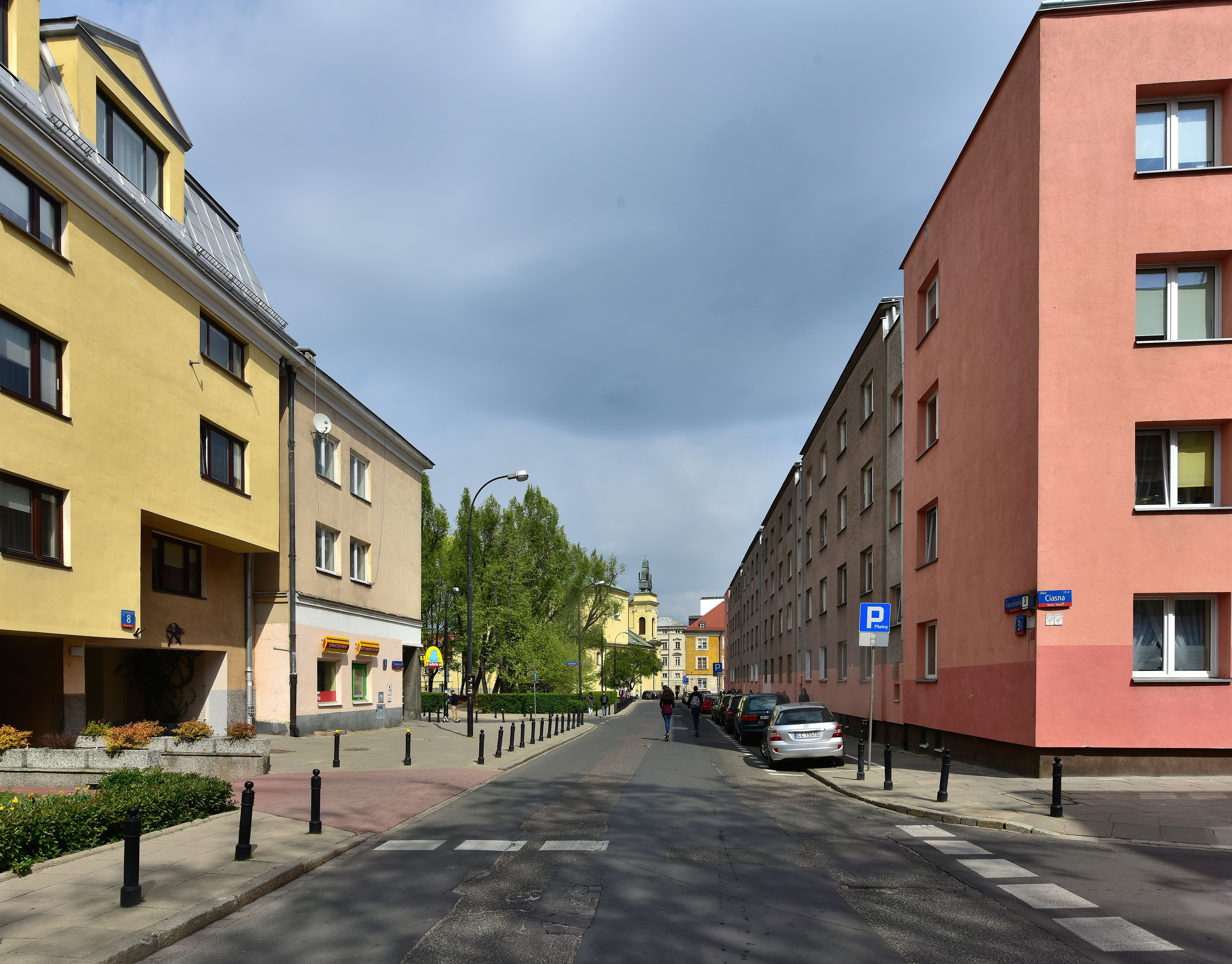 Ulica Franciszkańska w Warszawie na wysokości ul. Ciasnej, widok w kierunku wschodnim